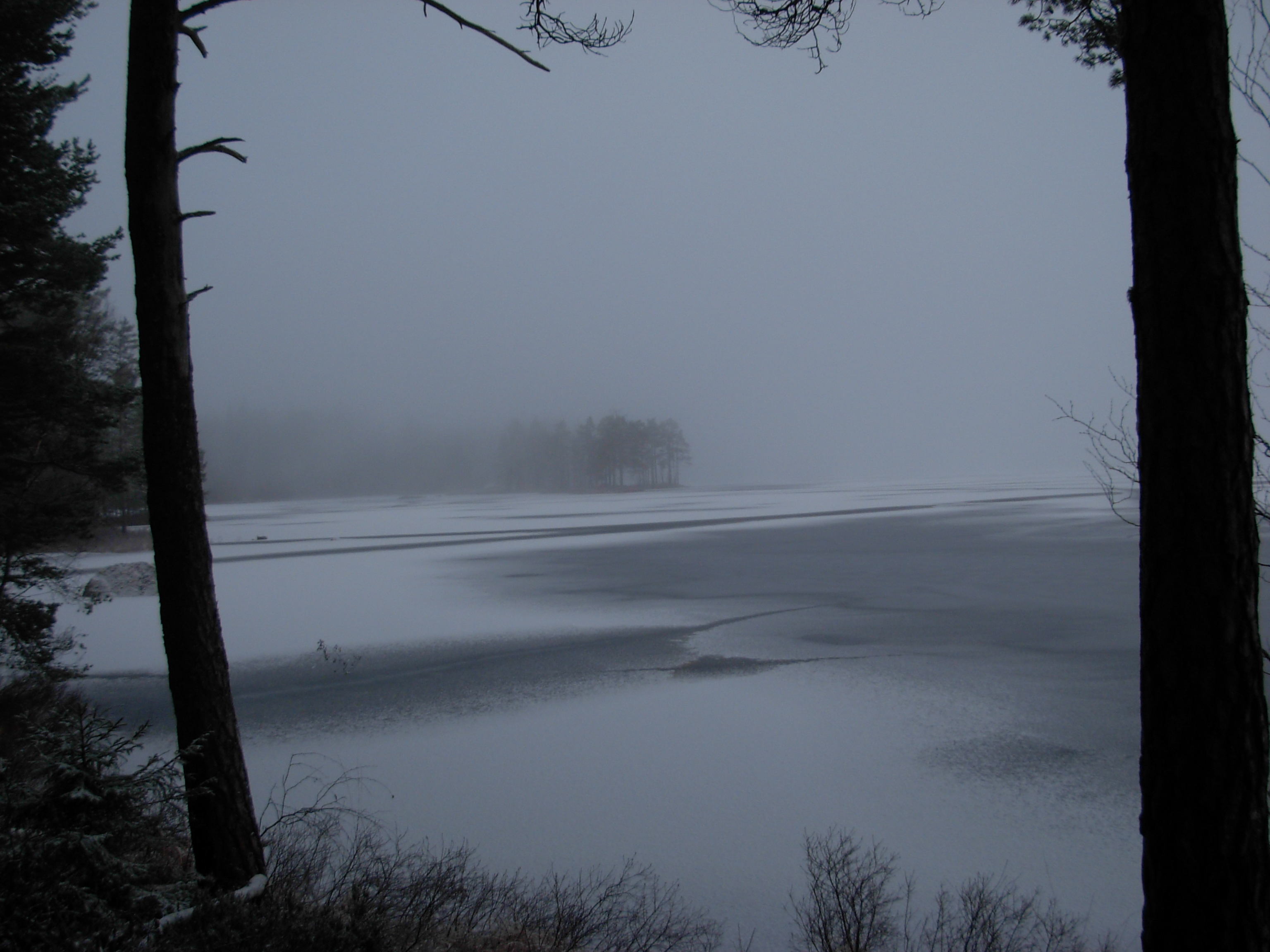 Kråksjön är en skogssjö i Tiveden.